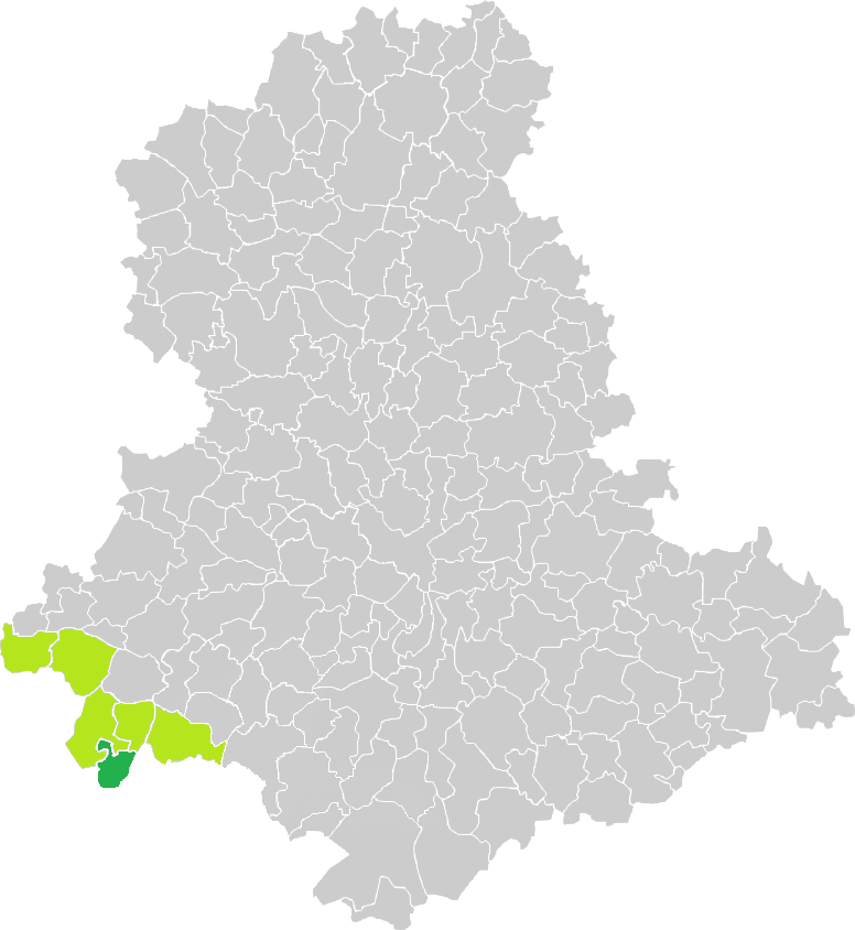 Carte de situation de la commune de Pensol (en vert foncé) dans le votre Canton (en vert clair) sur une carte des communes de la Haute-Vienne